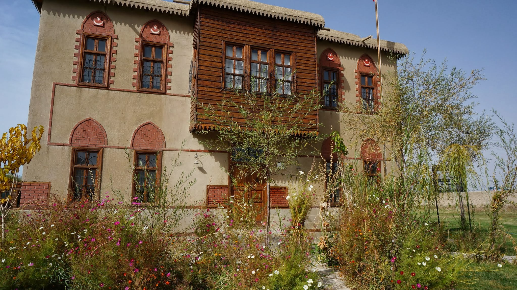 Van, Van Merkez/Van, Turkey